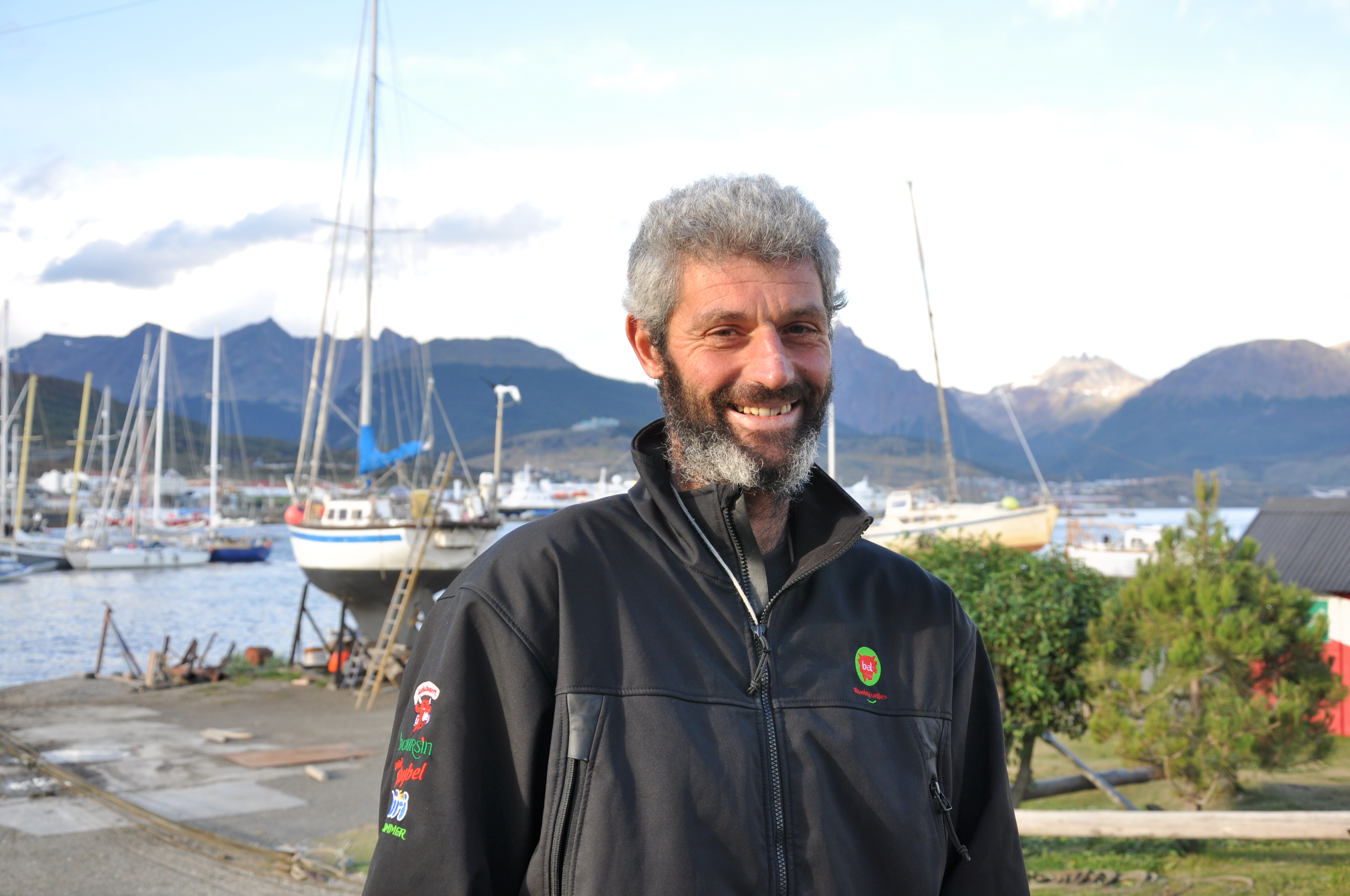 Sébastien Audigane en 2011 à Ushuaia - Terre de Feu, Argentine